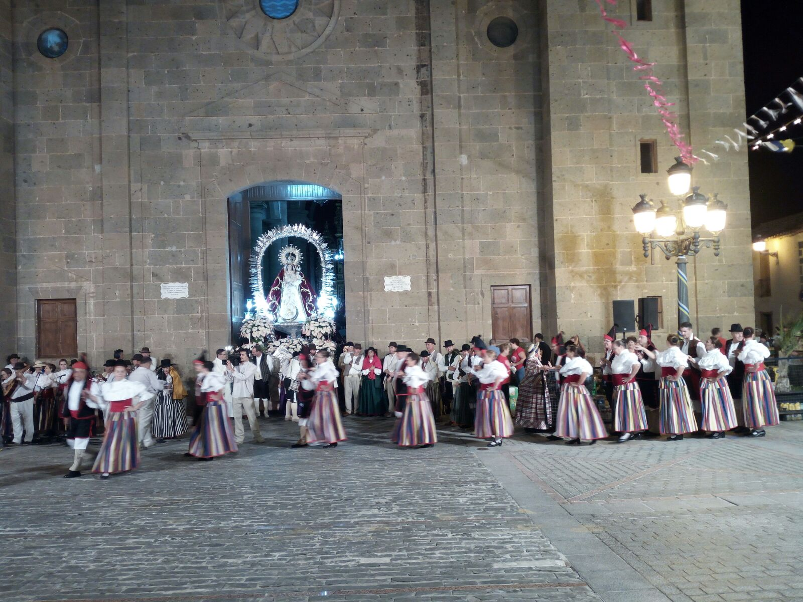 Fiestas de Nuestra Señora del Rosario This is a photography of a Folklore festival in Spain (Wikidata id Q23650279).